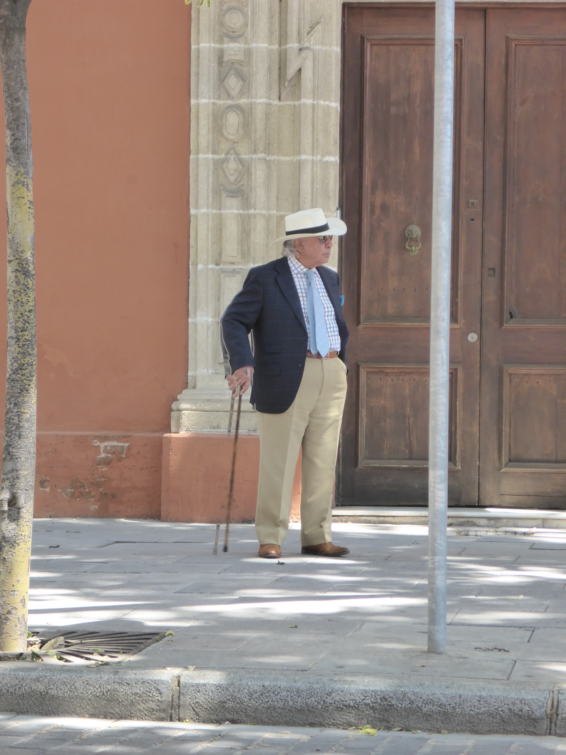 Manuel Morao en Jerez de la Frontera (Andalucía, España)